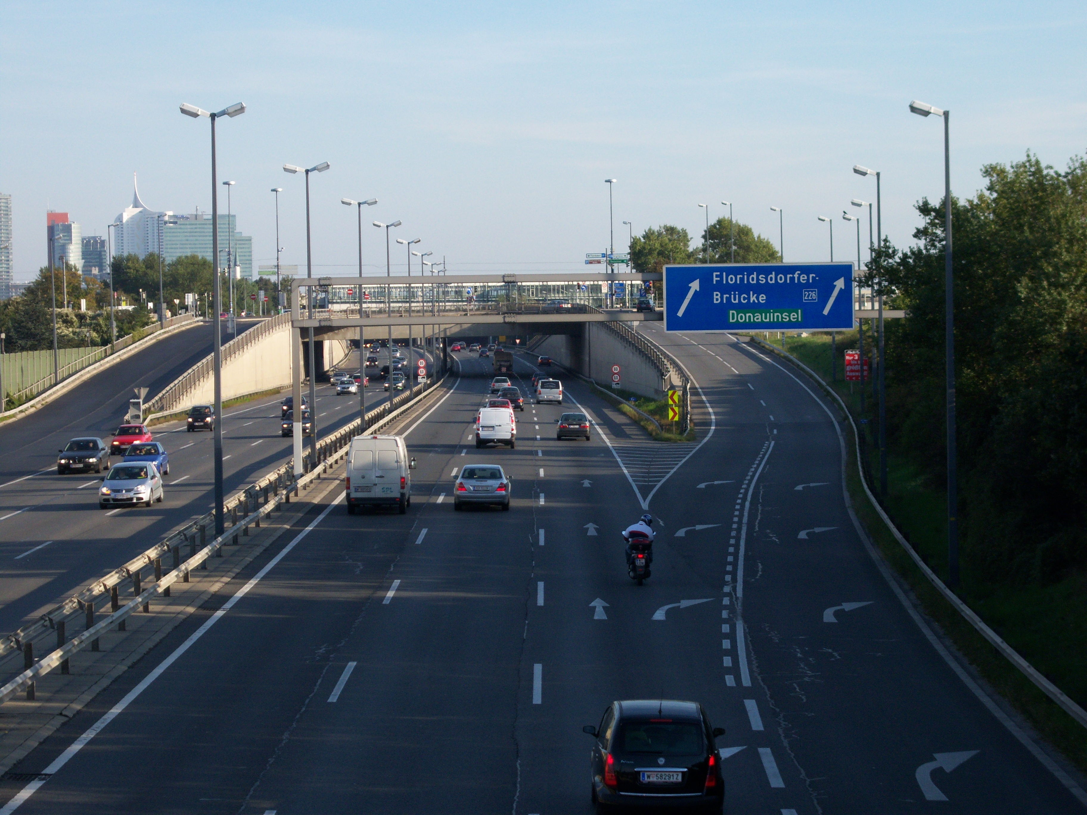 A22 Floridsdorfer Brücke